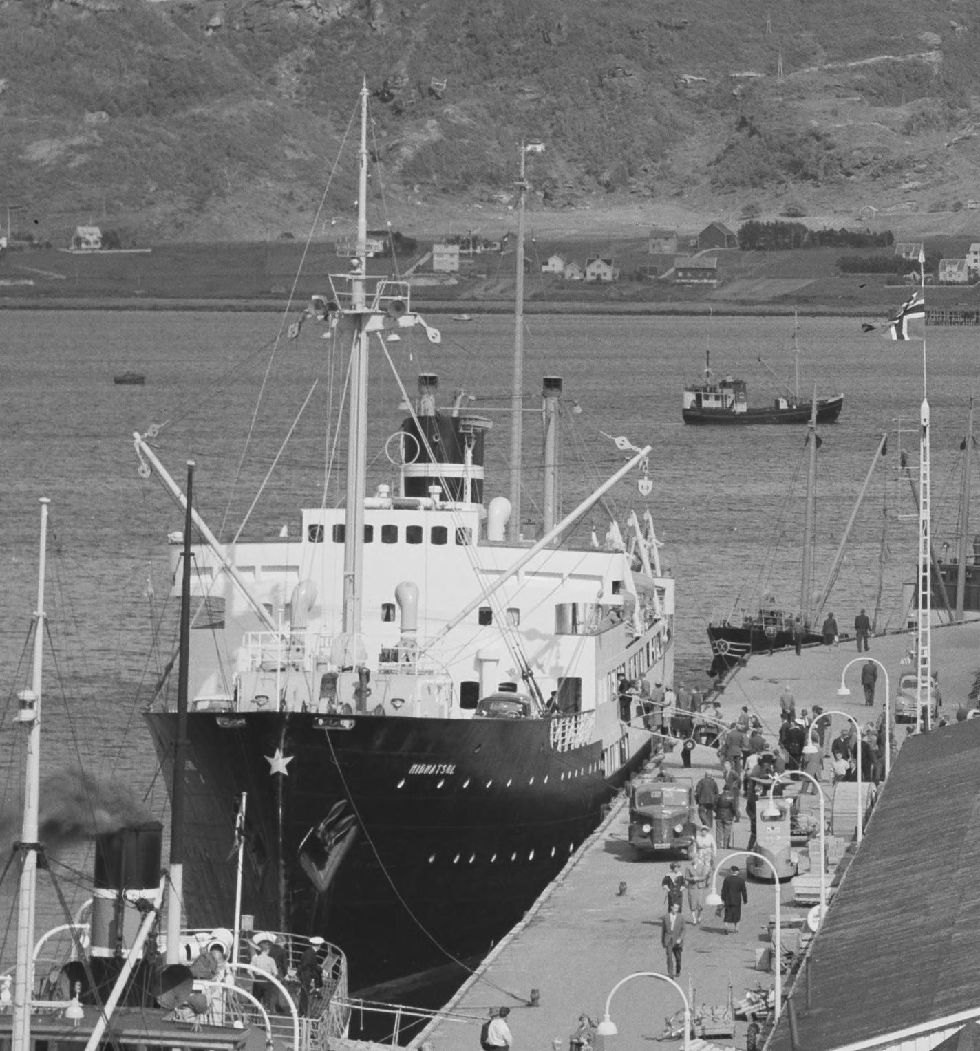 Bildet er hentet fra Nasjonalbibliotekets bildesamling. Anmerkninger til bildet var: Fotograf: L.S Bodø, Bodø, NordlandBeskrivelse: Det Bergenske Dampskibsselskabs hurtigruteskip MS Midnatsol (fra 1949) til kai i Bodø